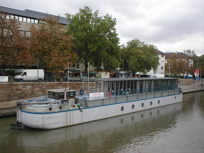 Theaterschiff in Heilbronn, Baden-Württemberg, Deutschland